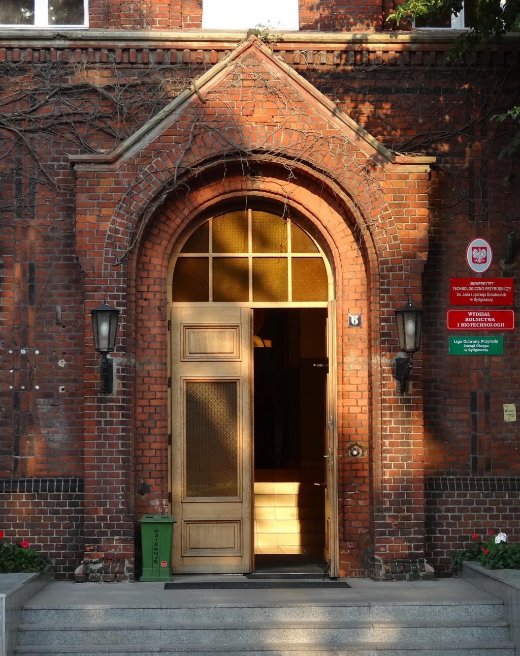 Budynek Bernardyńska 6 Bydgoszcz, Ewangelickie Seminarium Nauczycielskie 1880, ob. Wydział Rolniczy Uniwersytetu Technologiczno-Przyrodniczego